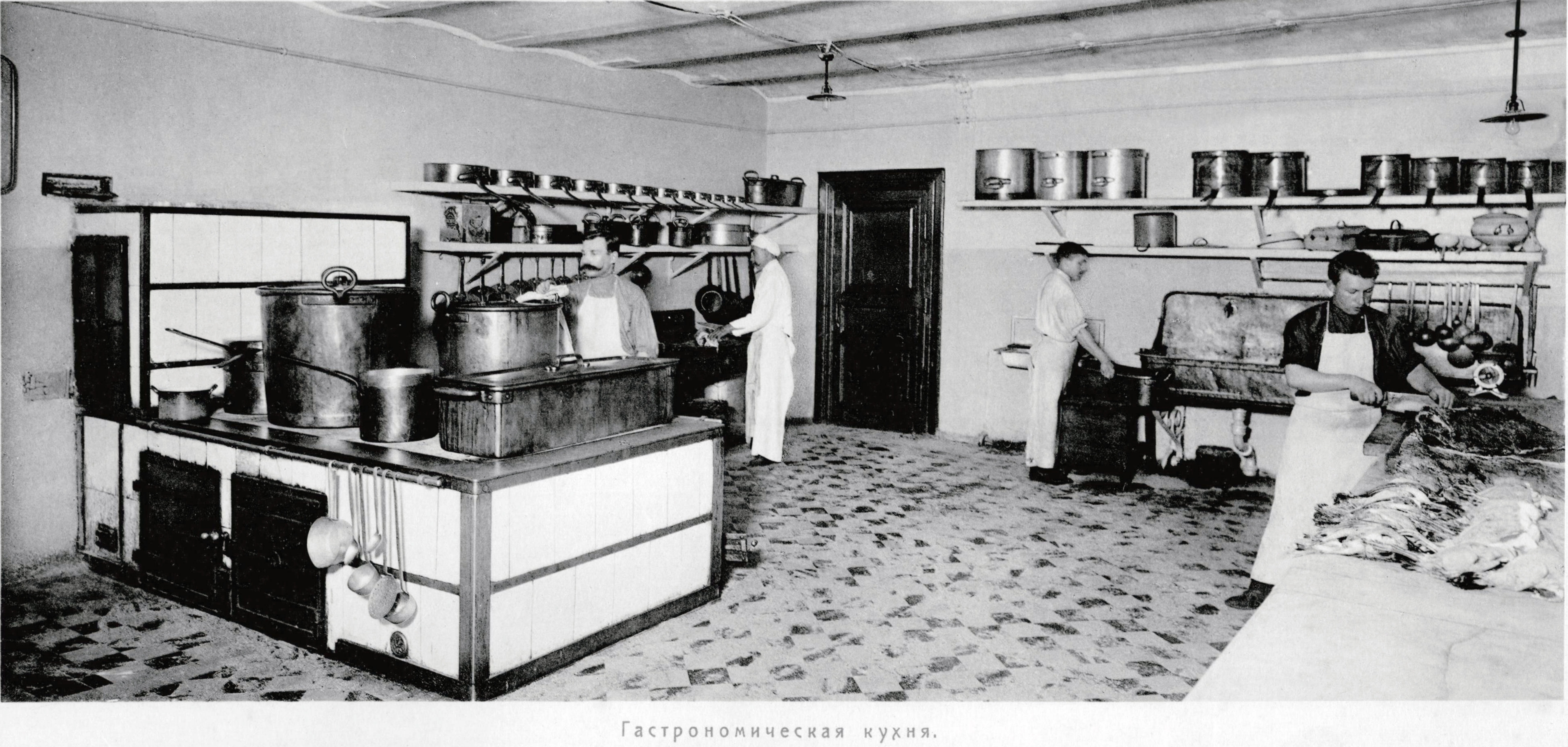 Магазин Елисеева и погреба русских и иностранных вин. Гастрономический цех